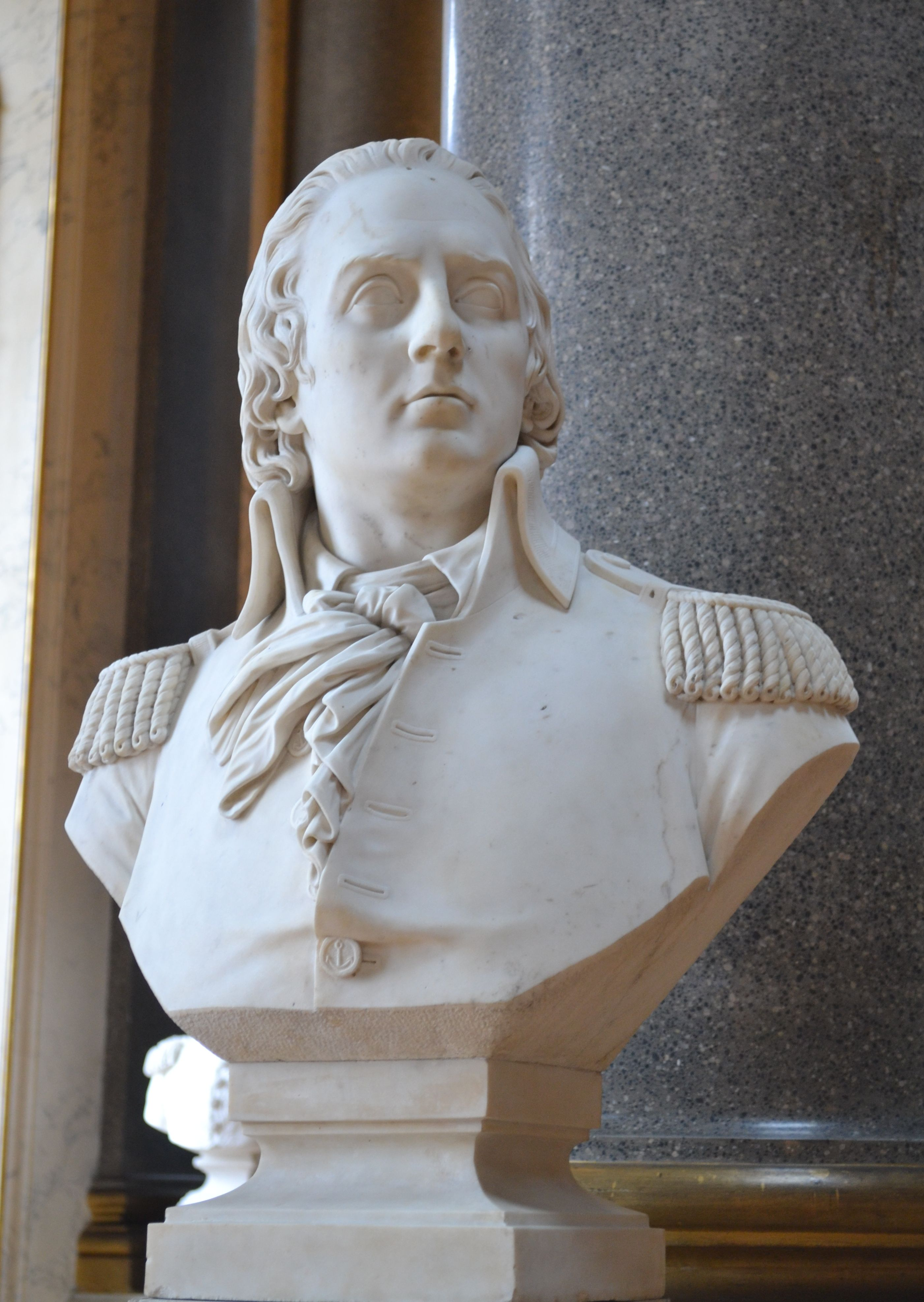 Buste de François Paul de Brueys d'Aigalliers, galerie des Batailles du château de Versailles.